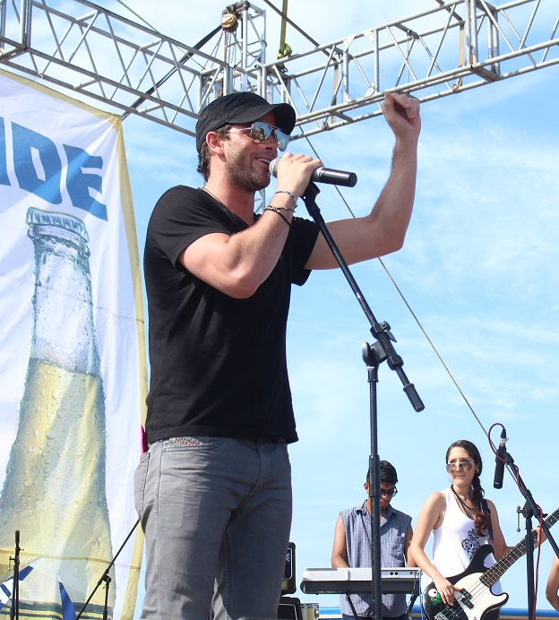 Mane de la Parra cantando en Veracruz, Ver. Corona Beach Party